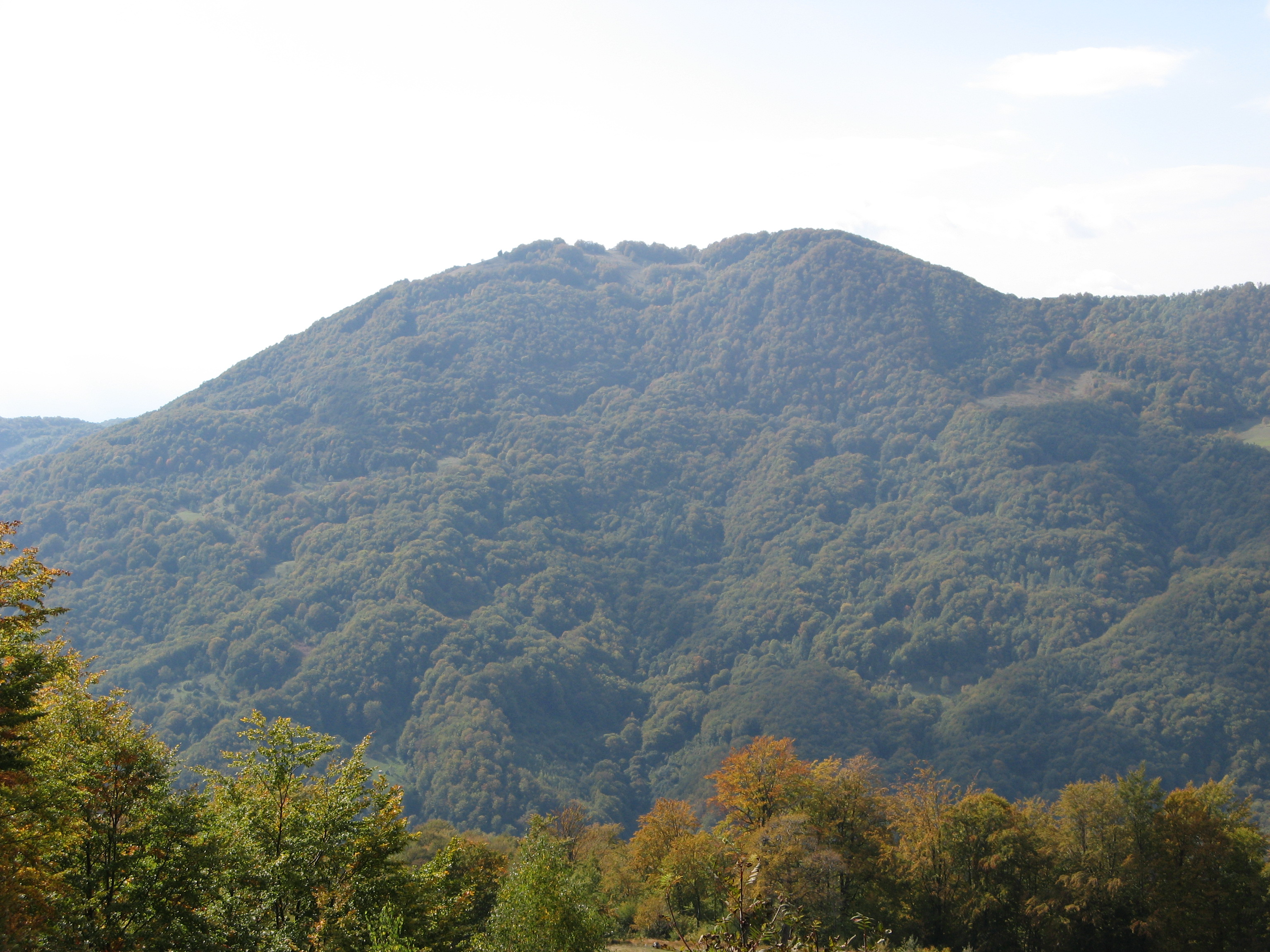 Гора Кобила (Рахівський р-н)